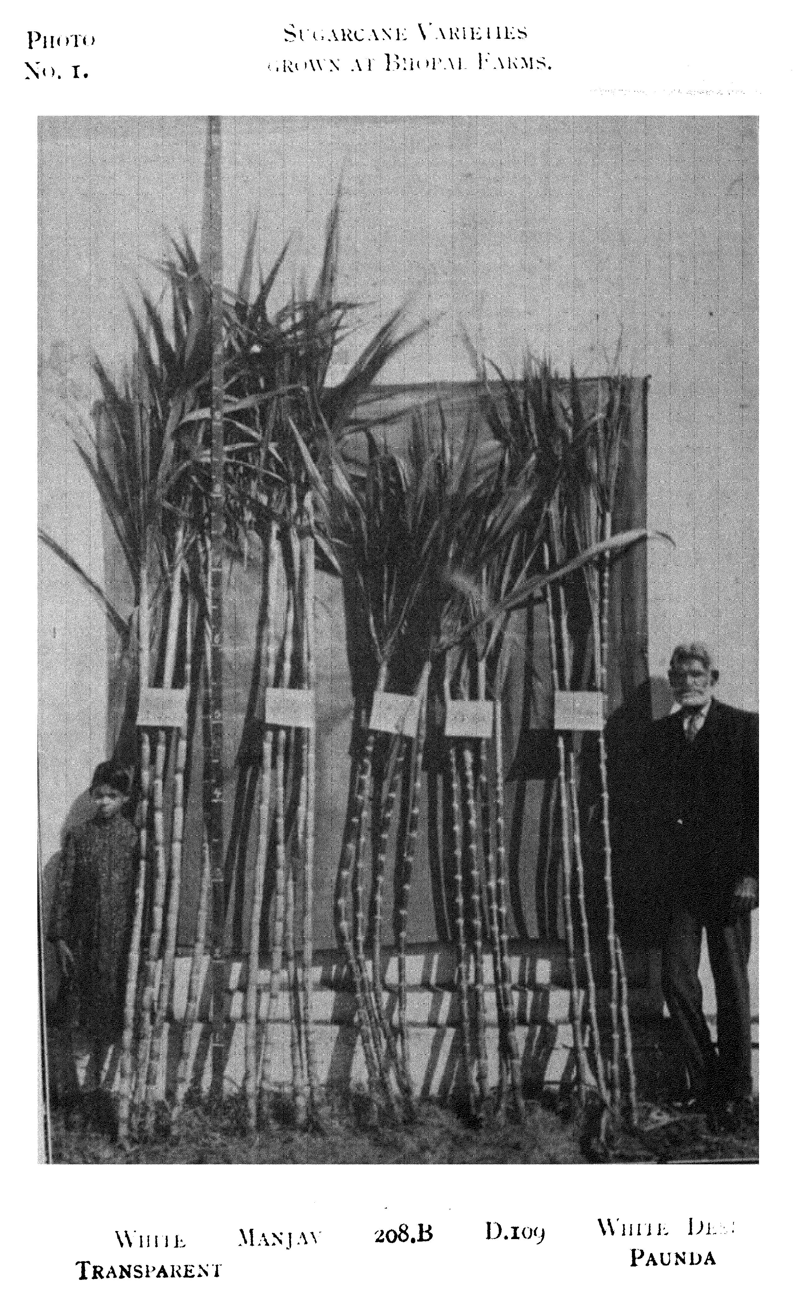 Sugar varieties grown in Bhopal in 1929